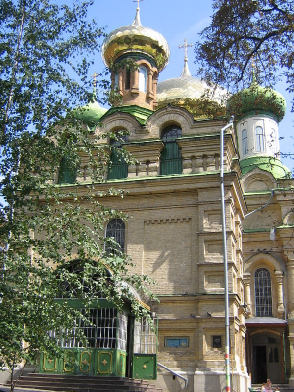 Kyiv